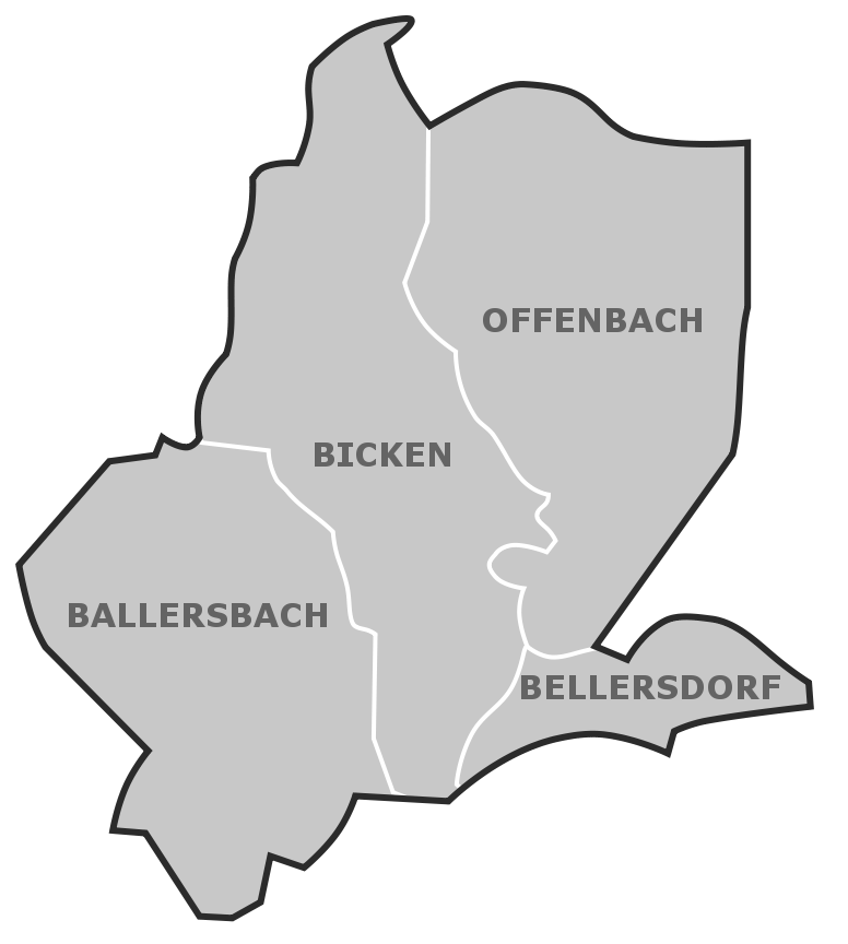 Ortsgliederung von Mittenaar, Hessen